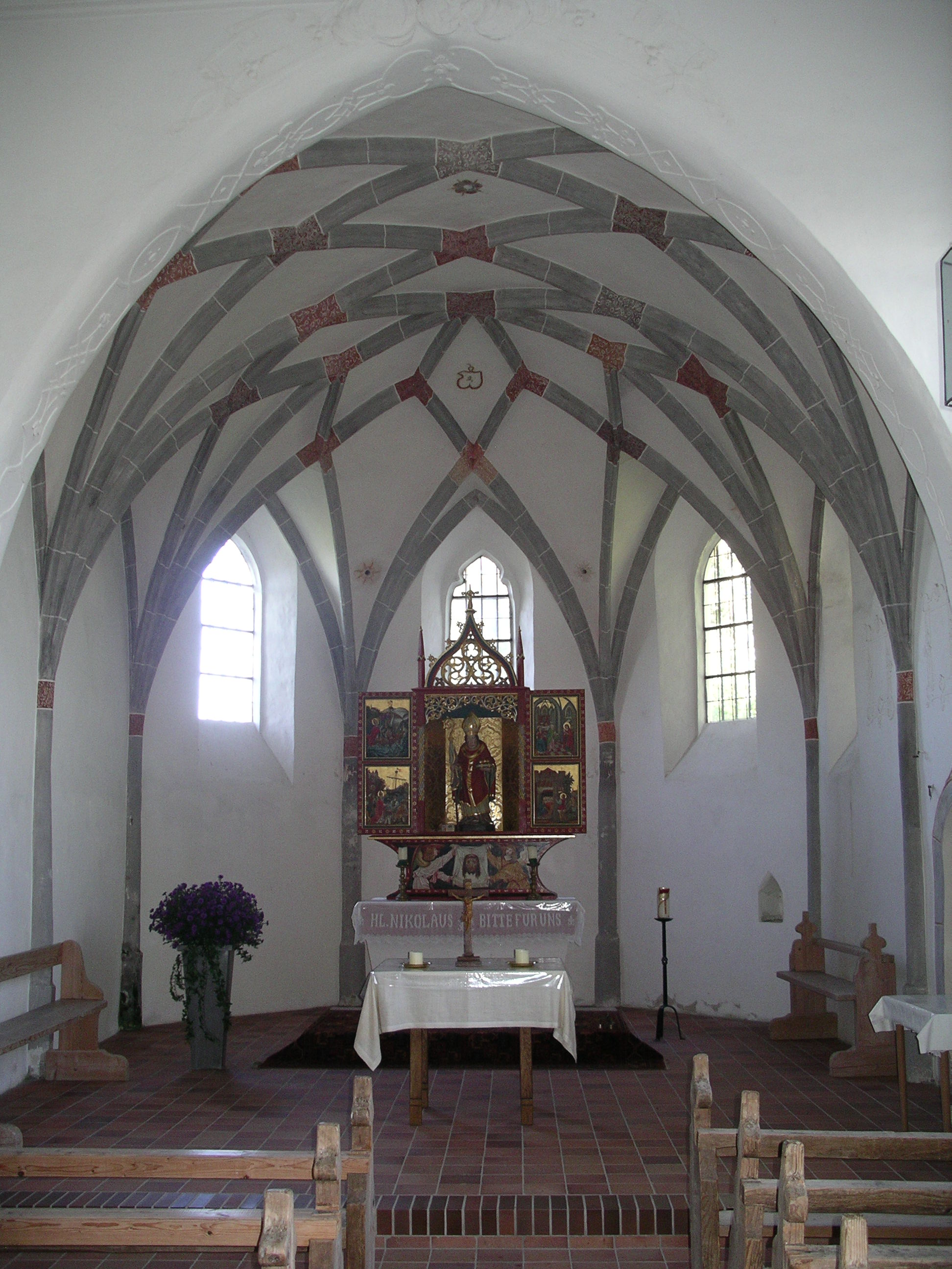 Filialkirche Rottersham, Gde. Ruhstorf a.d. Rott